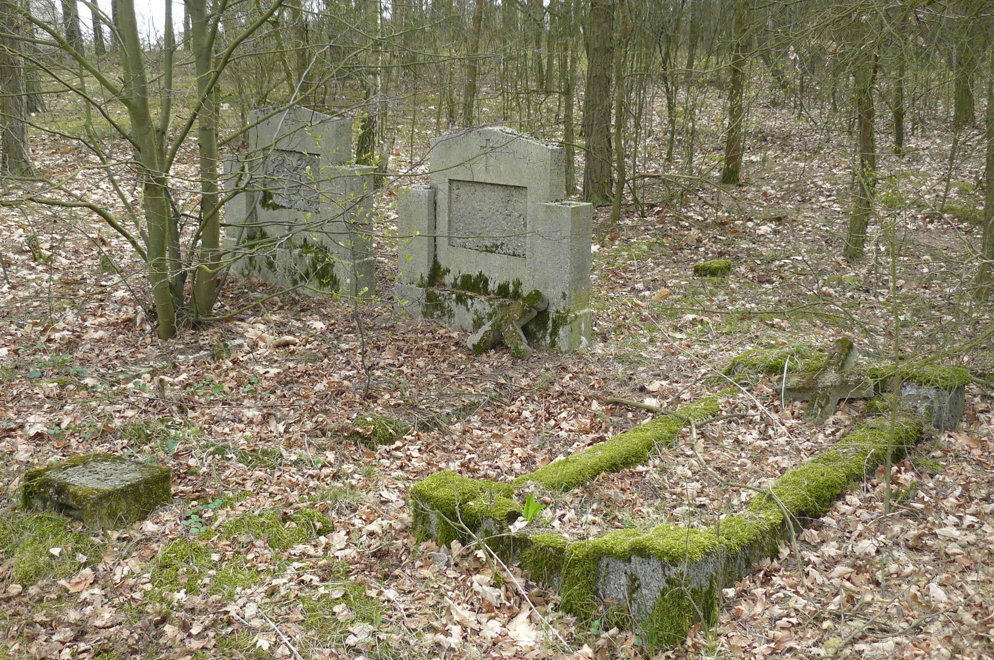 Kolonia Lisewo - cmentarz ewangelicki. Stan na IV 2014r.